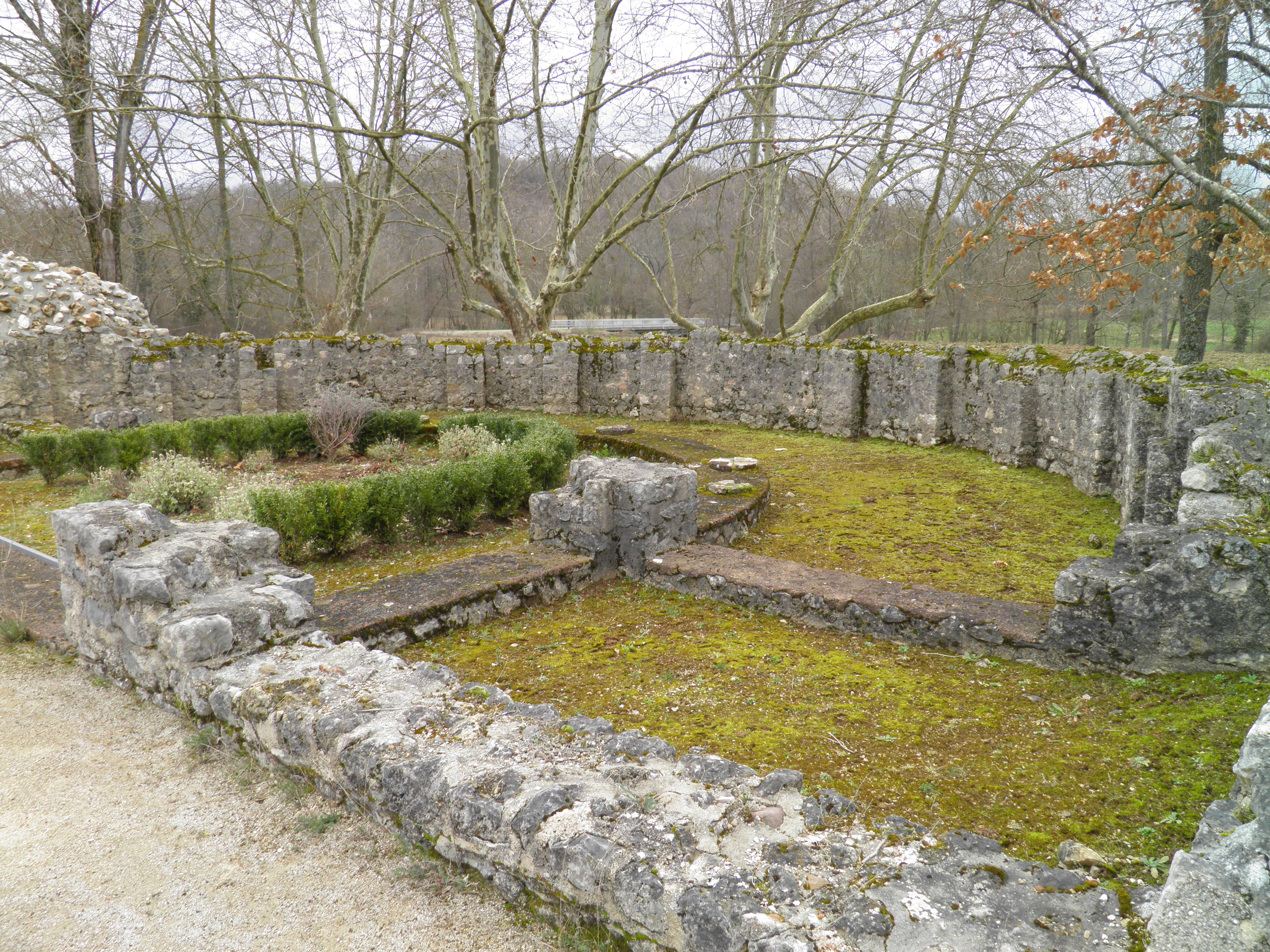 Gallo-Roman villa of Montmaurin, France